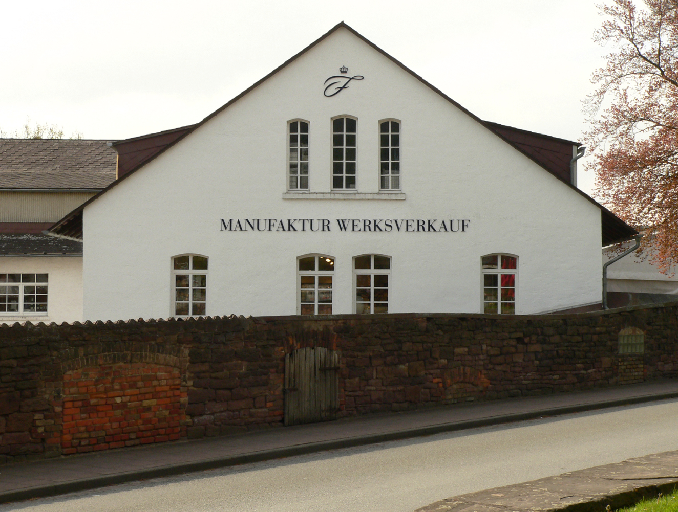 Werksverkauf der Porzellanmanufaktur Fürstenberg, davor Holzlagerschuppen